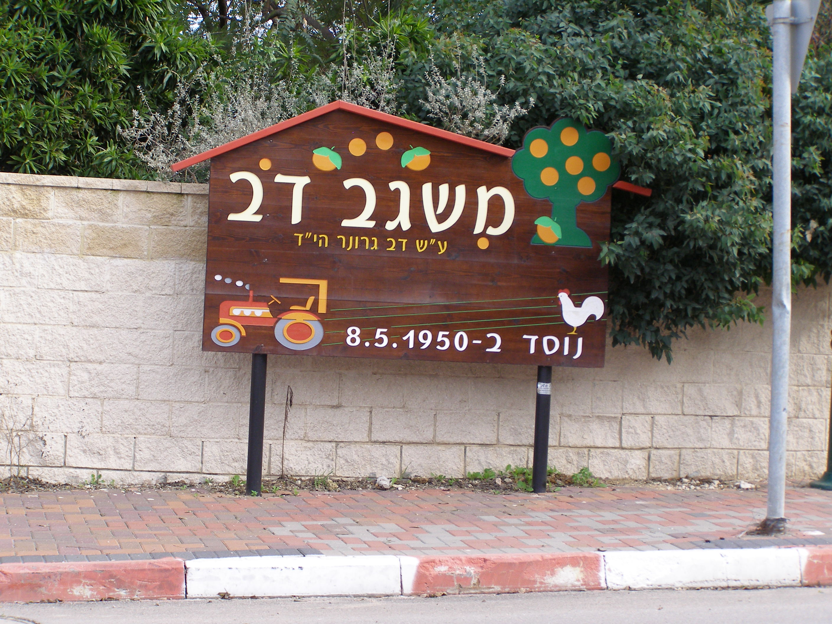 Misgav Dov